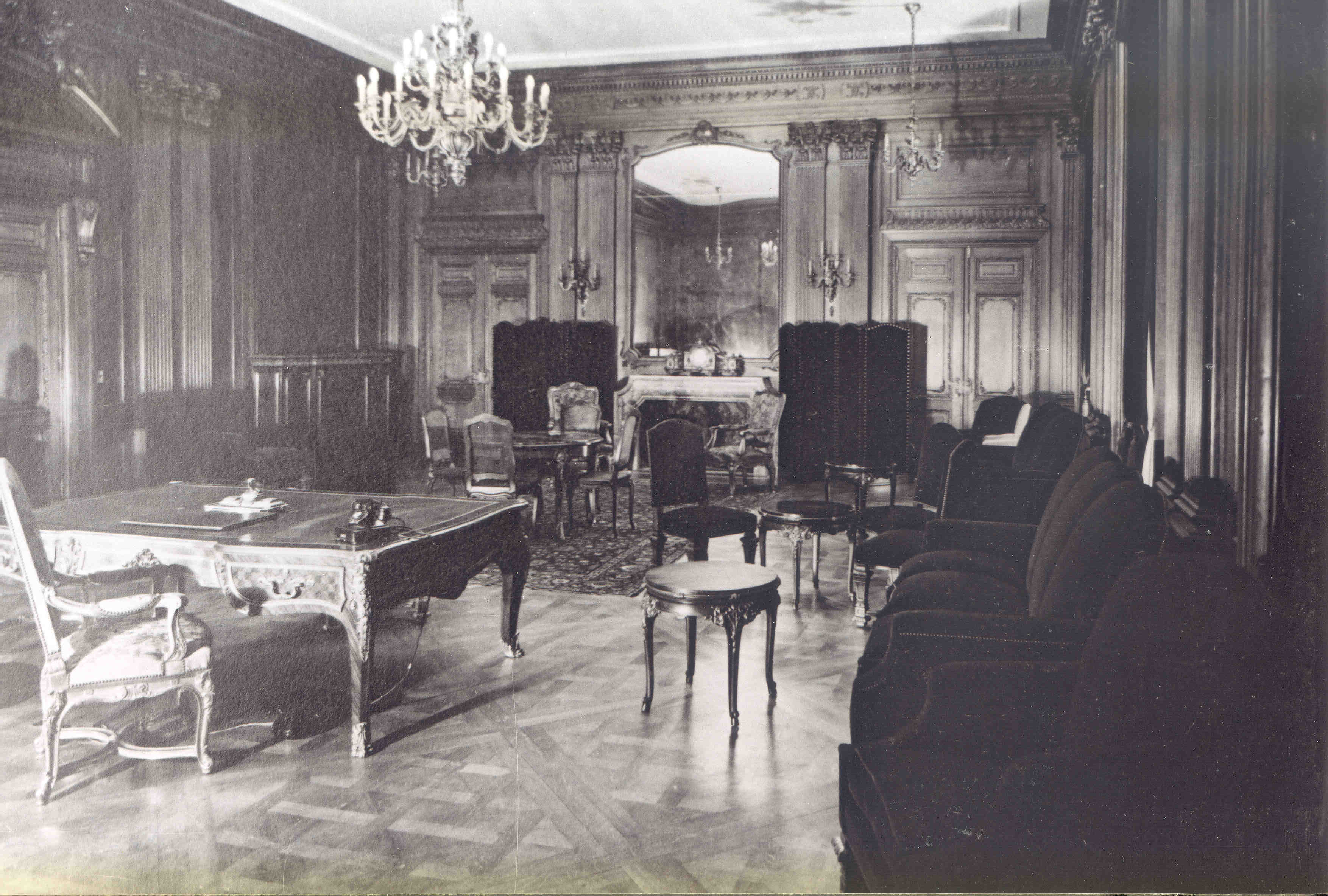 Imagen histórica del Palacio de la Legislatura de la Ciudad de Buenos Aires